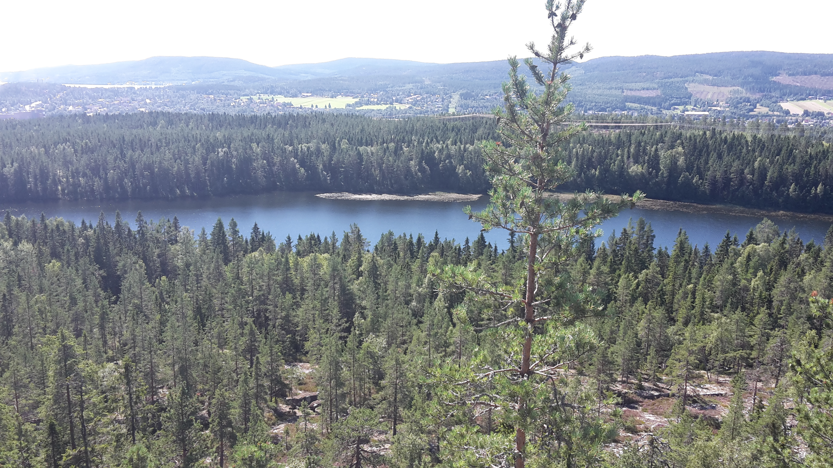 Hörnsjön fotograferat från Varvsberget 2015.